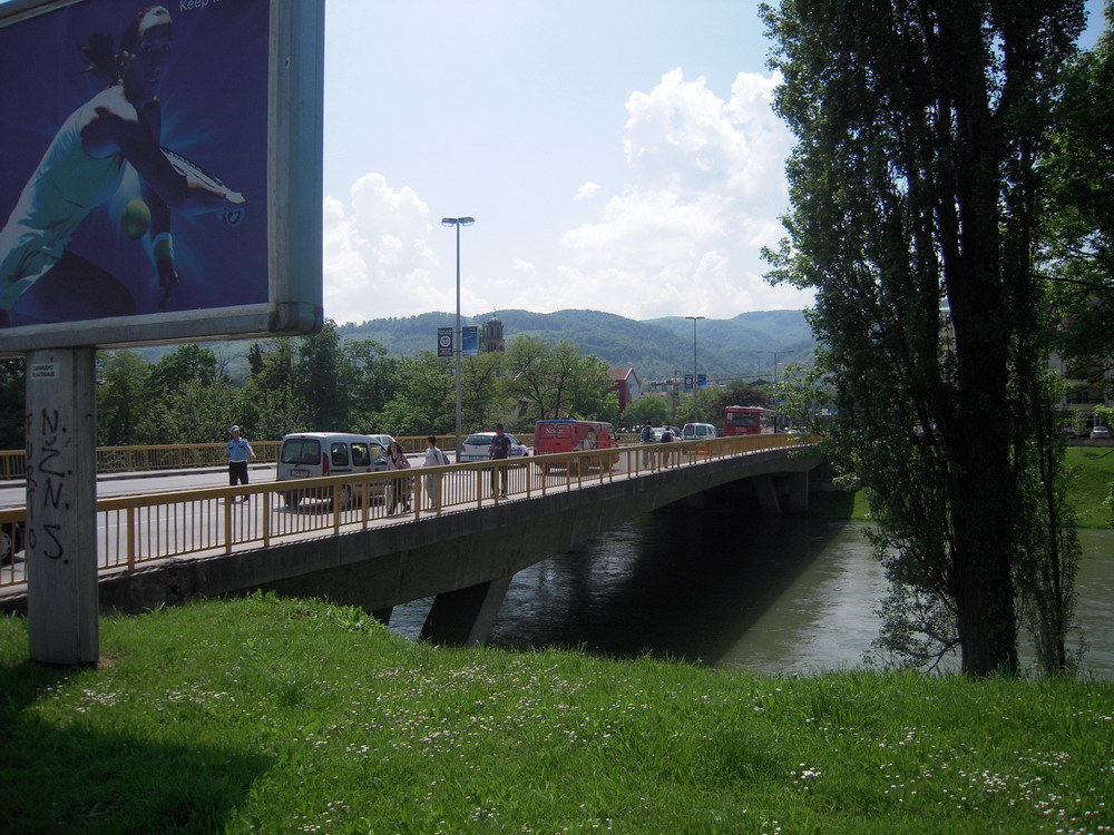 Rebrovački_most